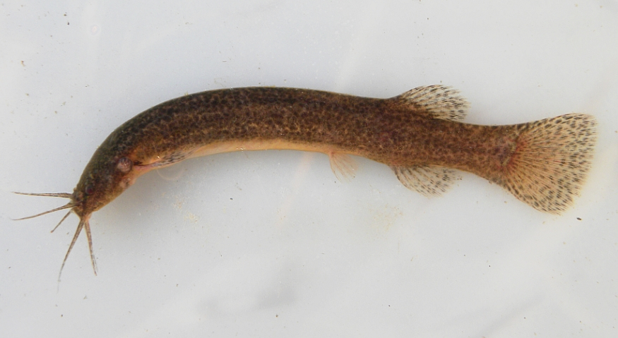 Ituglanis australis